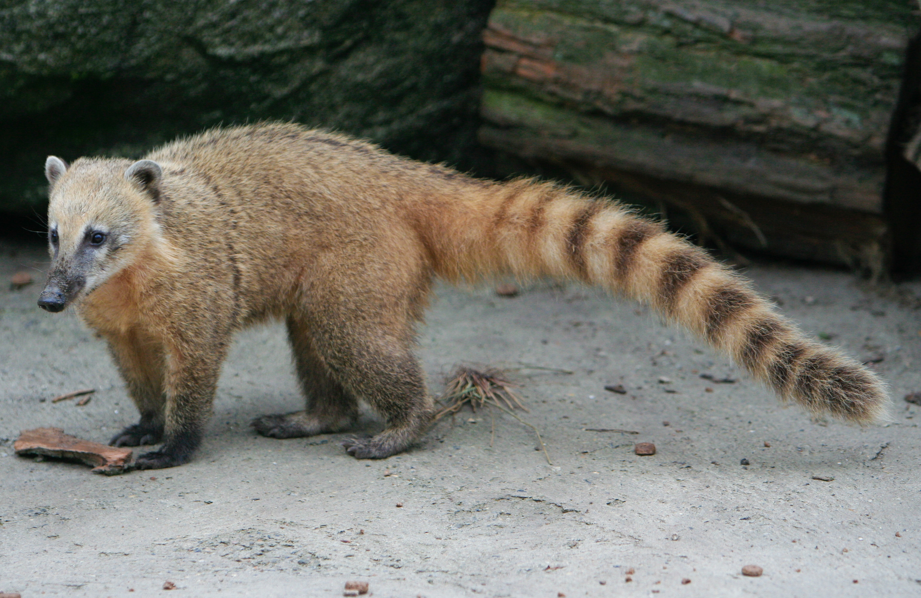 A ring tailed coati (nasua nasua)._MG_5117